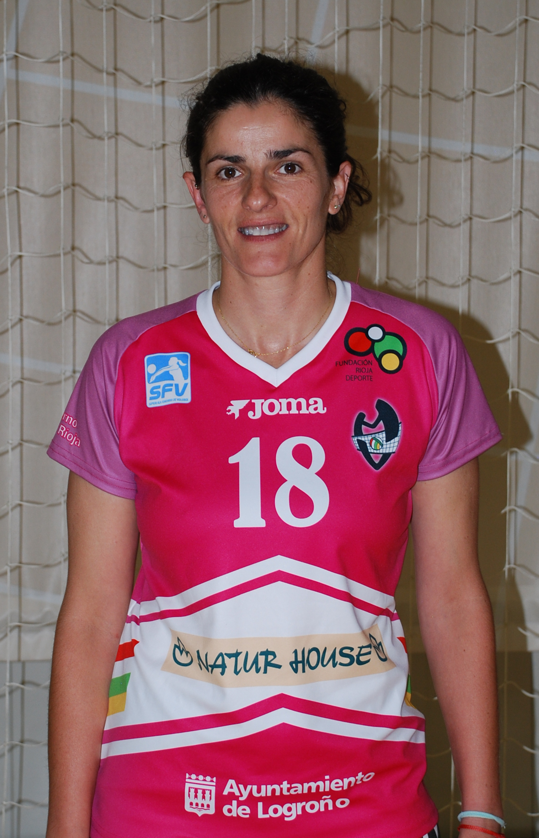 Esther López, jugadora profesional de voleibol